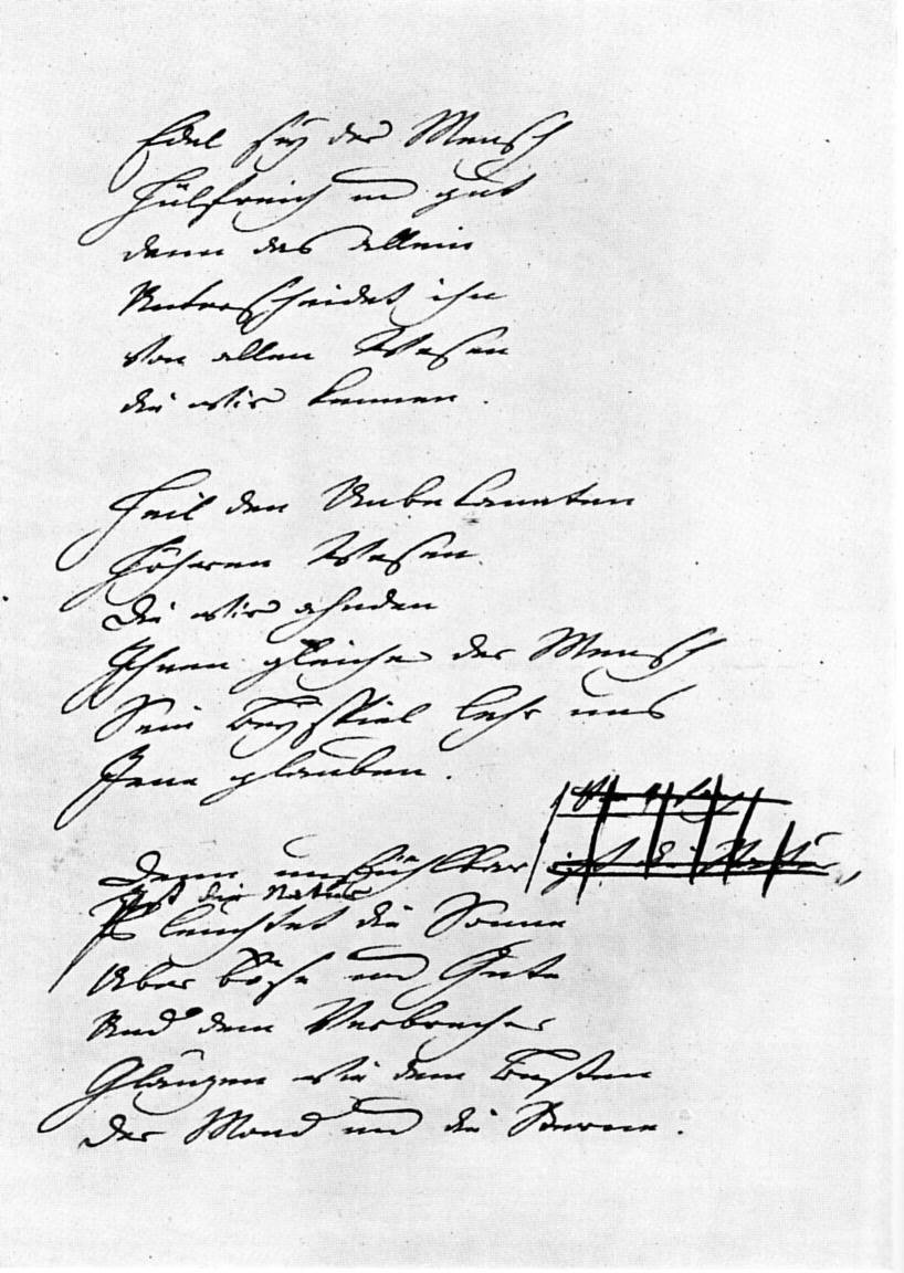 Das Göttliche Handschrift von Goethe. Frühe, noch unausgefeilte Fassung des Gedichts. Die Niederschrift ist eigenhändig adressiert: "Fräulein von Jöchhausen". Als edelstes Dokument für die Umwandlung des Goethischen Titanismus in den Humanismus wird es hier zwischen die "Zehn Jahre" und die "Italienische Reise" gestellt.